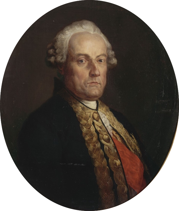 Toussaint-Guillaume, comte de La Motte-Piquet (1720-1791)